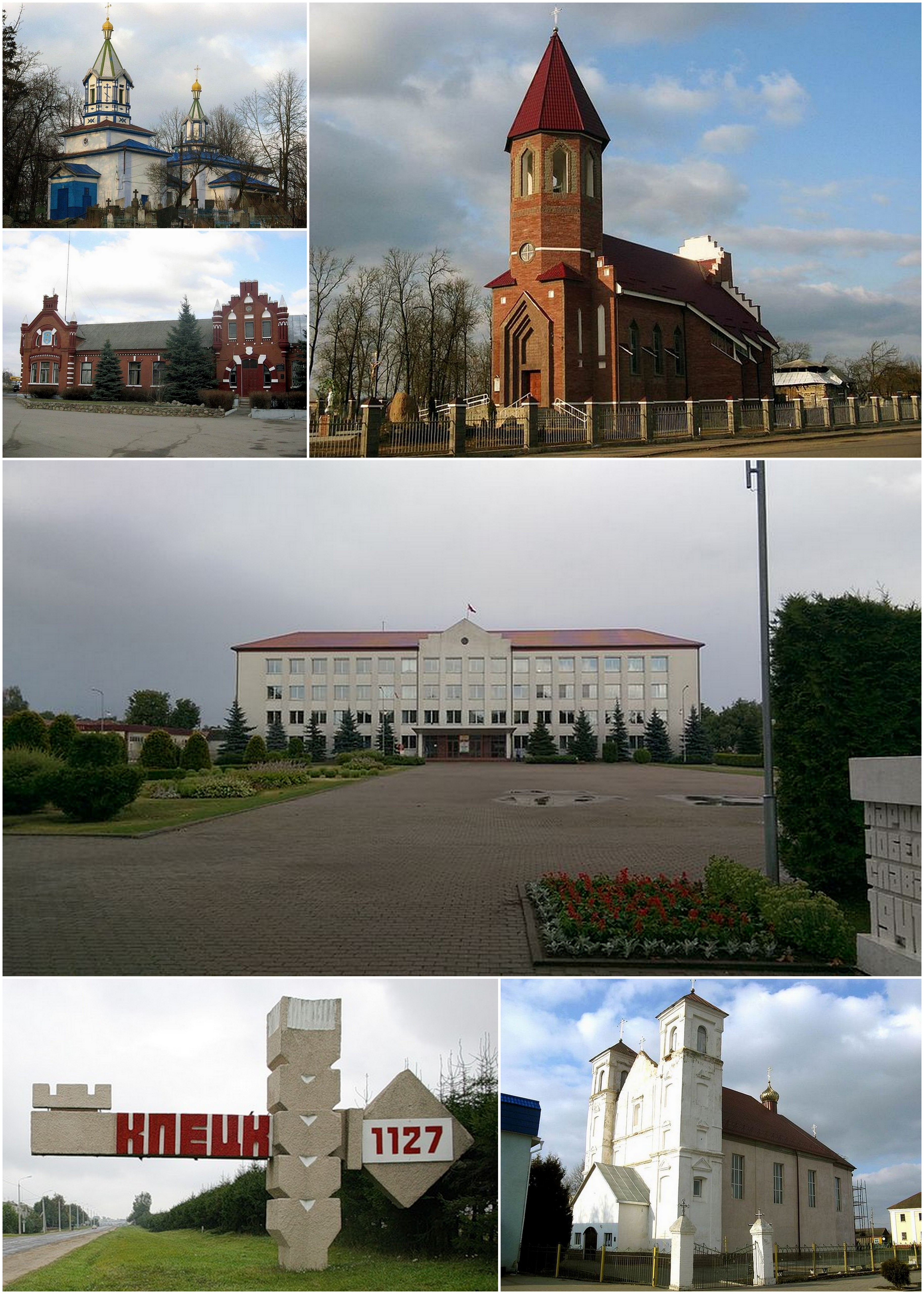 Калаж для артыкулаў пра Клецк з фотаздымкаў